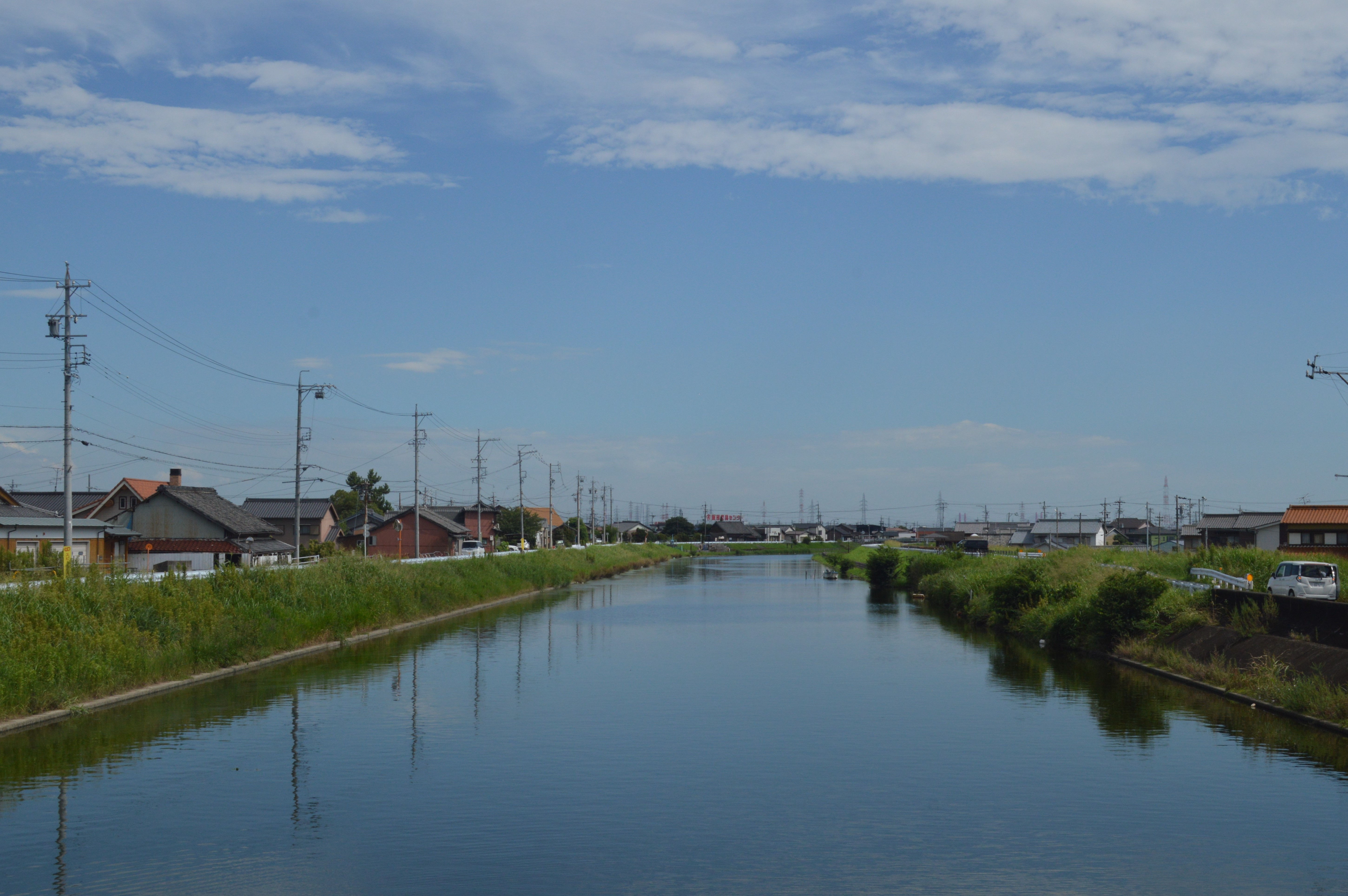 愛知県海部郡蟹江町を流れる蟹江川。月見橋から下流方向を向いて撮影。